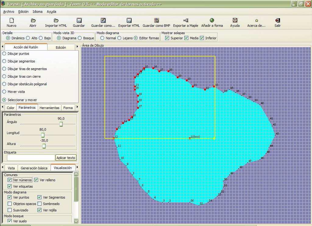 Pantallazo del software Vorest